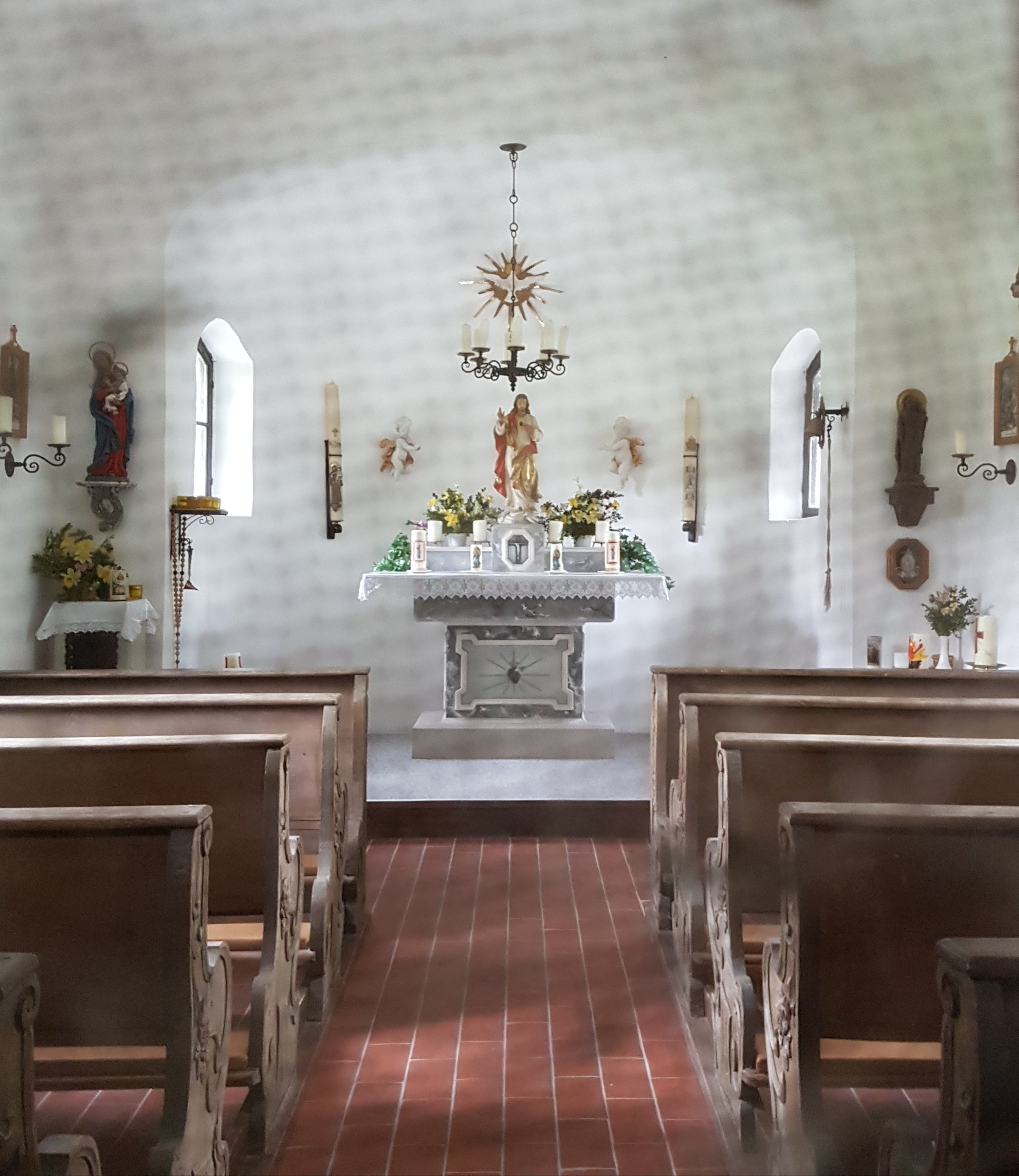 Schönmühl (Penzberg), Blick durch das vergitterte Türfenster